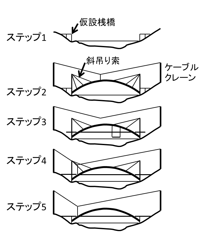 熊本県宇城市・上天草市を結ぶ天城橋の建設ステップ、ステップ1: 路面高に仮設桟橋を設けそこから橋台と橋脚を建設する、ステップ2: ケーブルクレーンを設置し、斜吊り索で支えながらソリッドリブアーチを建設する、ステップ3: 橋脚から両側へPC橋桁を建設しながら、ソリッドリブアーチから部品を吊り上げて鋼補剛桁を取り付ける、ステップ4: 接合桁を取り付ける、ステップ5: 調整桁と閉合桁を取り付けて完成する